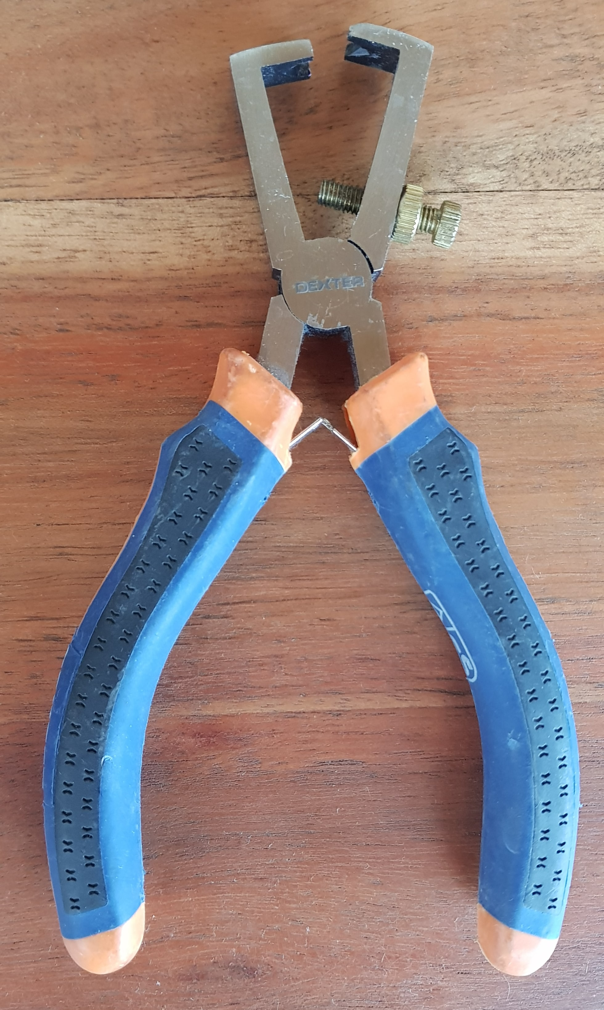 Peladora de cables eléctricos